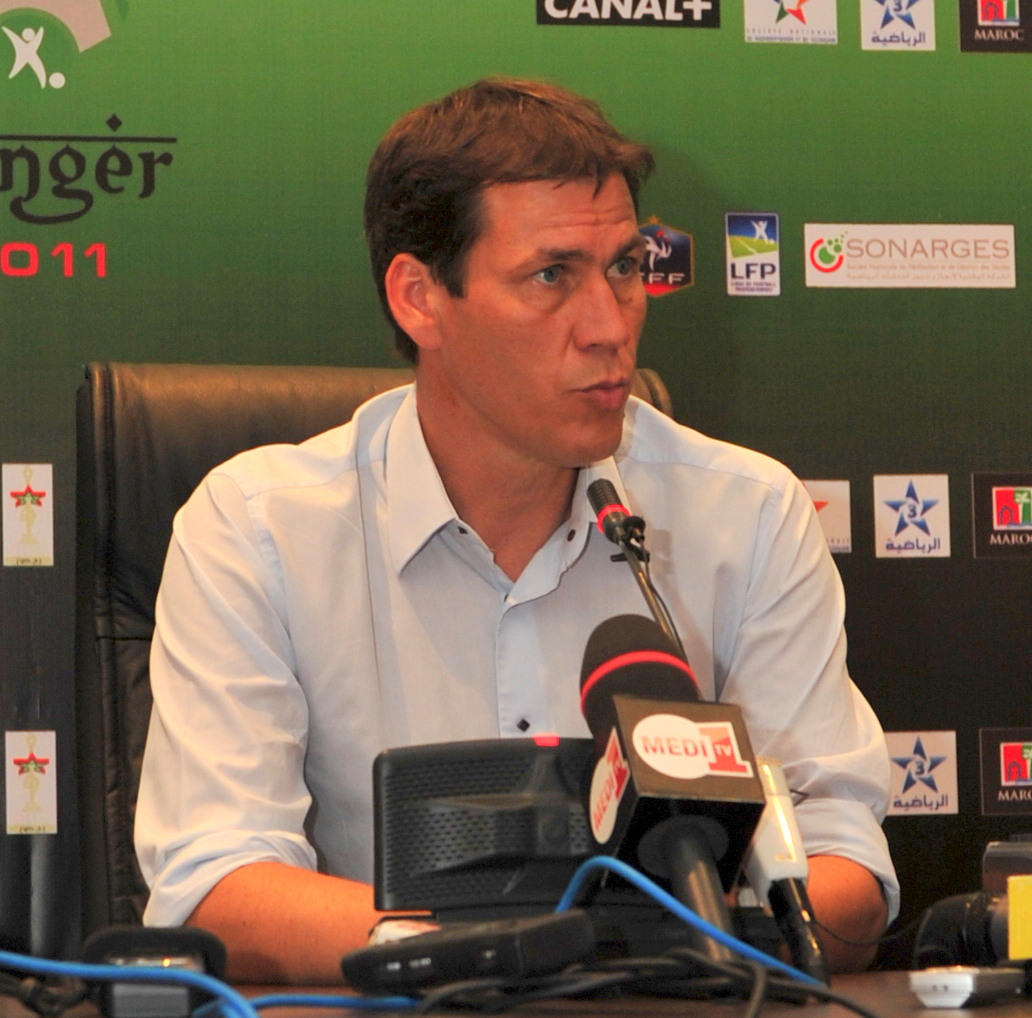 Rudi Garcia en conférence de presse du Trophée des champions 2011